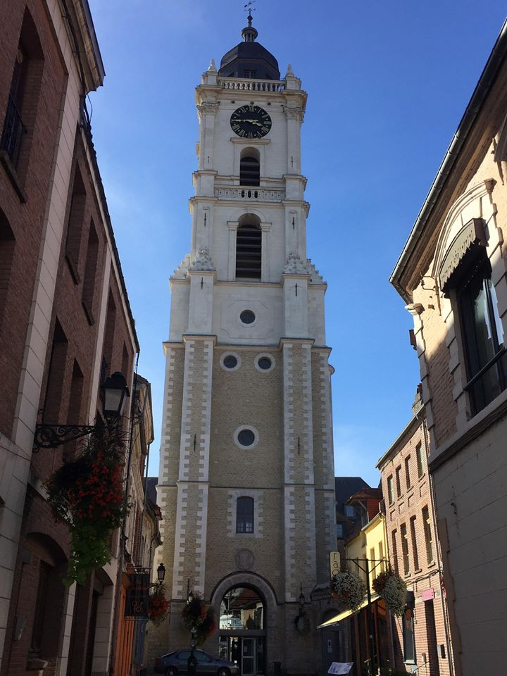 Beffroi d'Aire-sur-la-Lys, vu de la rue Hunnebelle